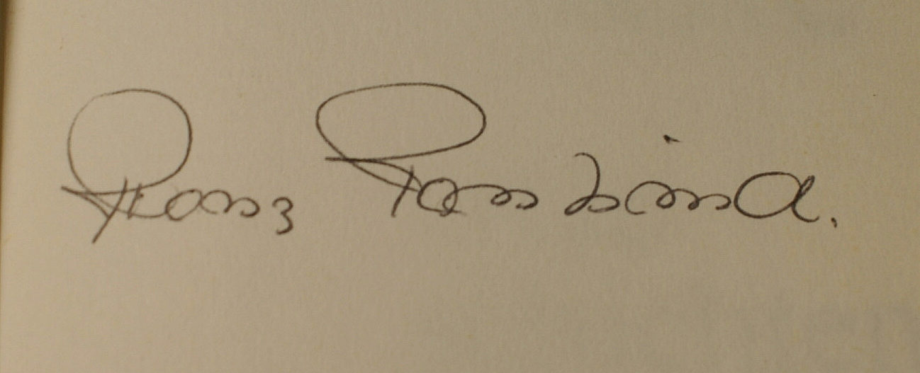 Aus seinem Buch "Vorfällle - 13 Geschichten aus dem unheimlichen Alltag", erschienen im Pendo Verlag, Zürich